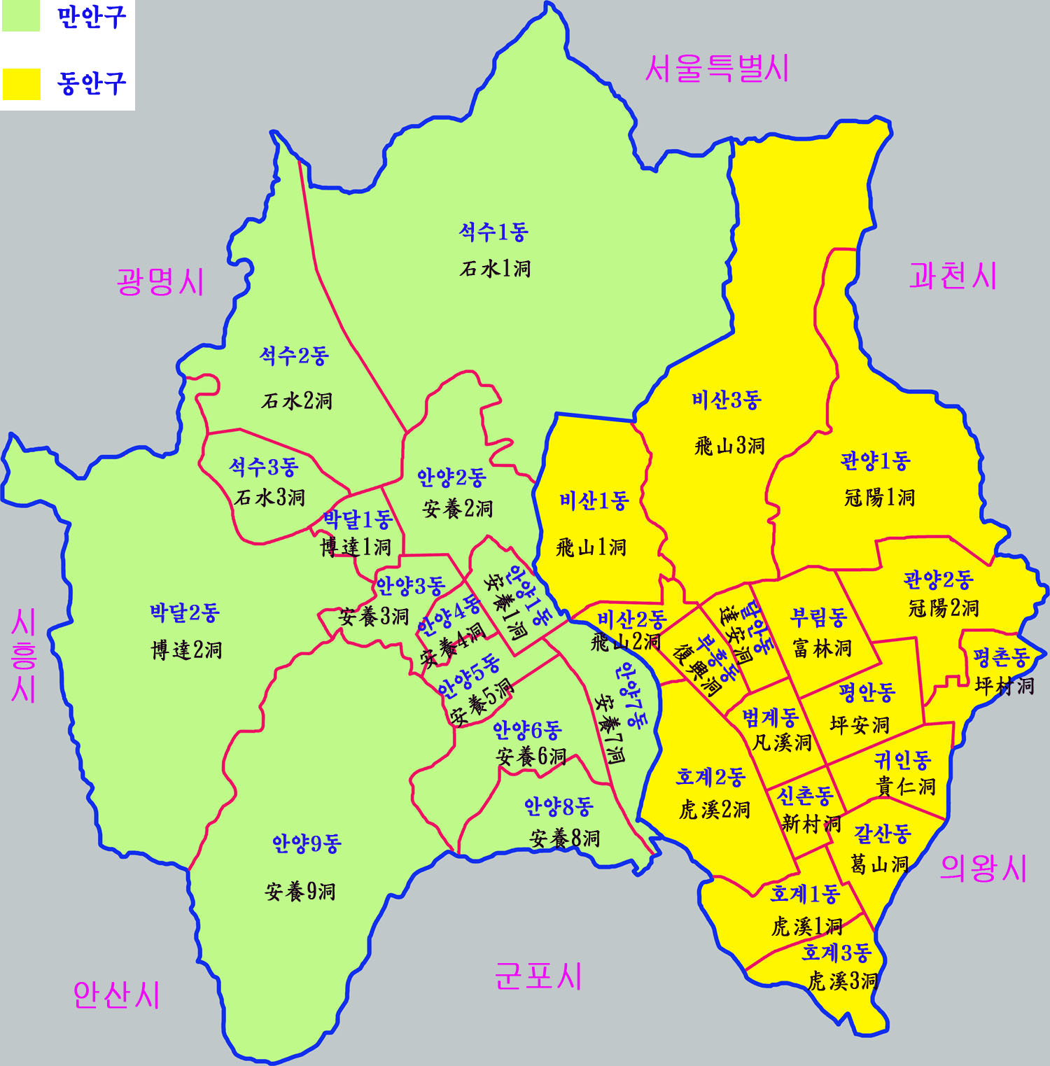 안양시 행정구역도